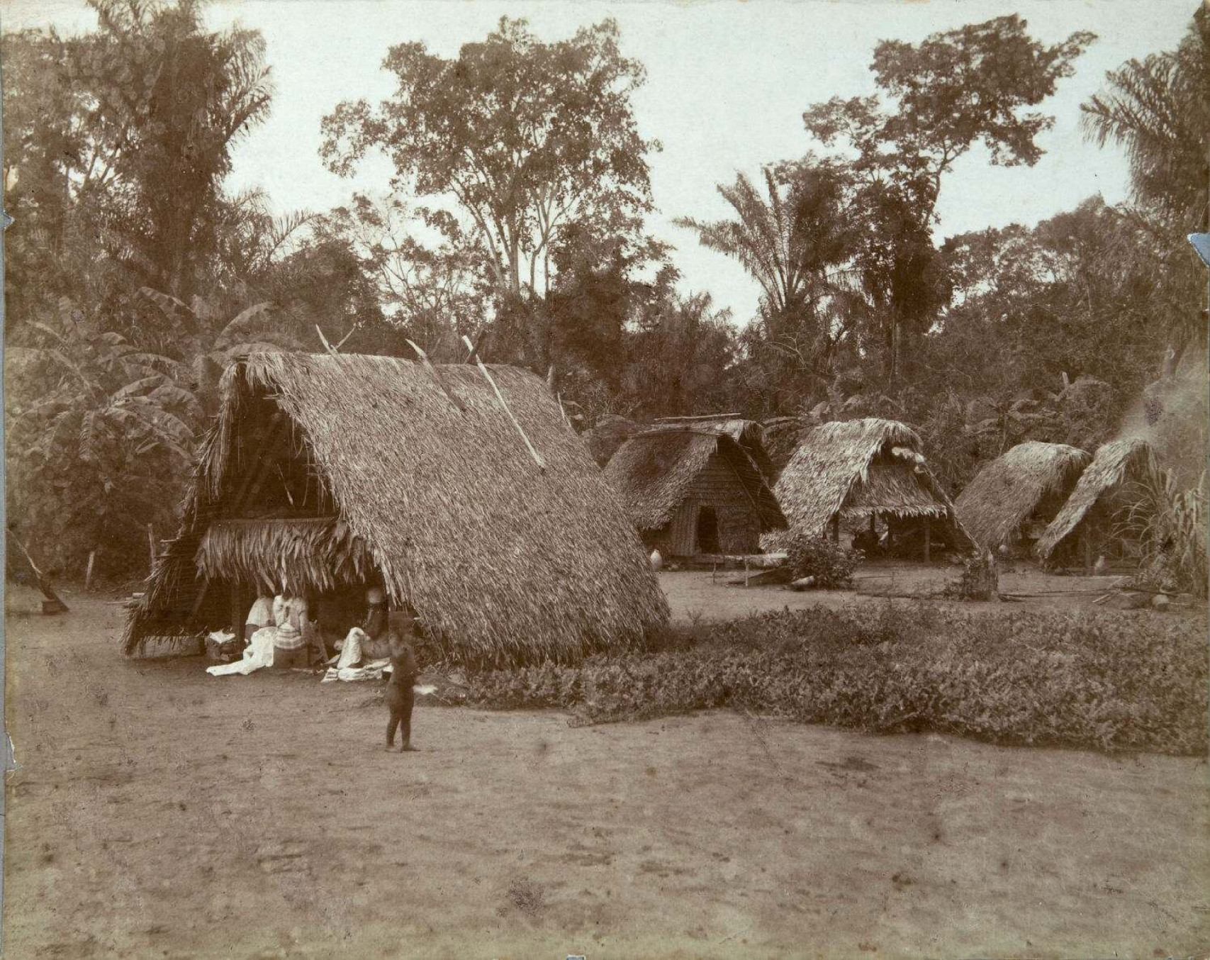 Foto. In Koffiekamp was een deel van de bewoners gekerstend maar niet het hele dorp.. Hutten in het Marron dorp Koffiekamp